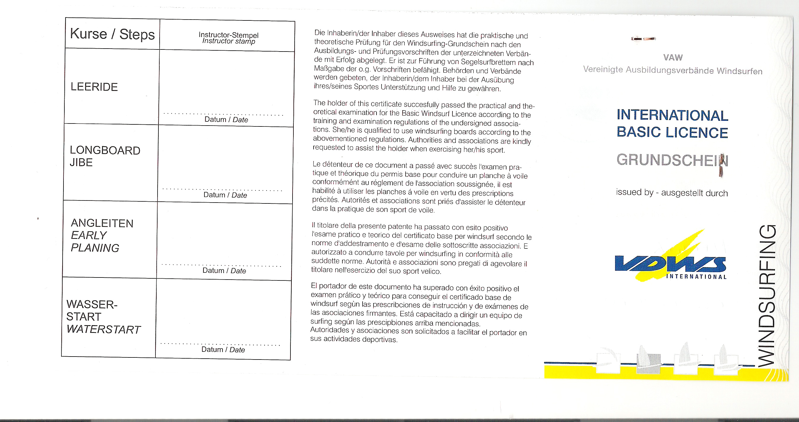 Windsurfing Schein